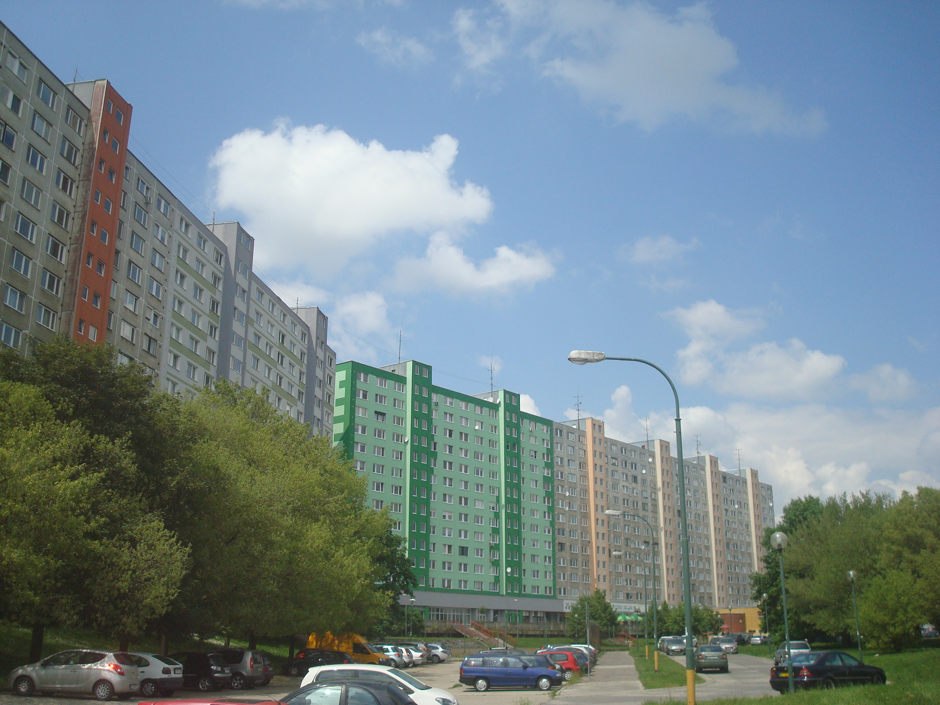 Beňadická street and Víglašská street, Petržalka, Bratislava, Slovakia